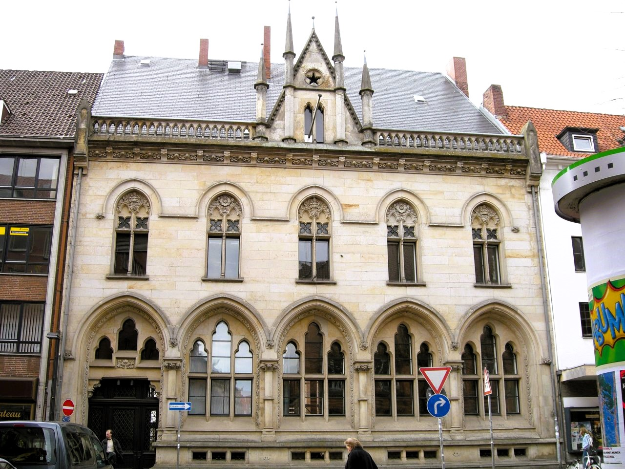 ehemalige Reichsbankfiliale zu Lübeck (eigene Aufnahme) Institut für Medizingeschichte der Universität zu Lübeck.